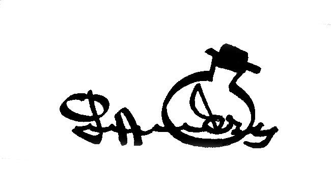 Logo Gérard Aubry 2014